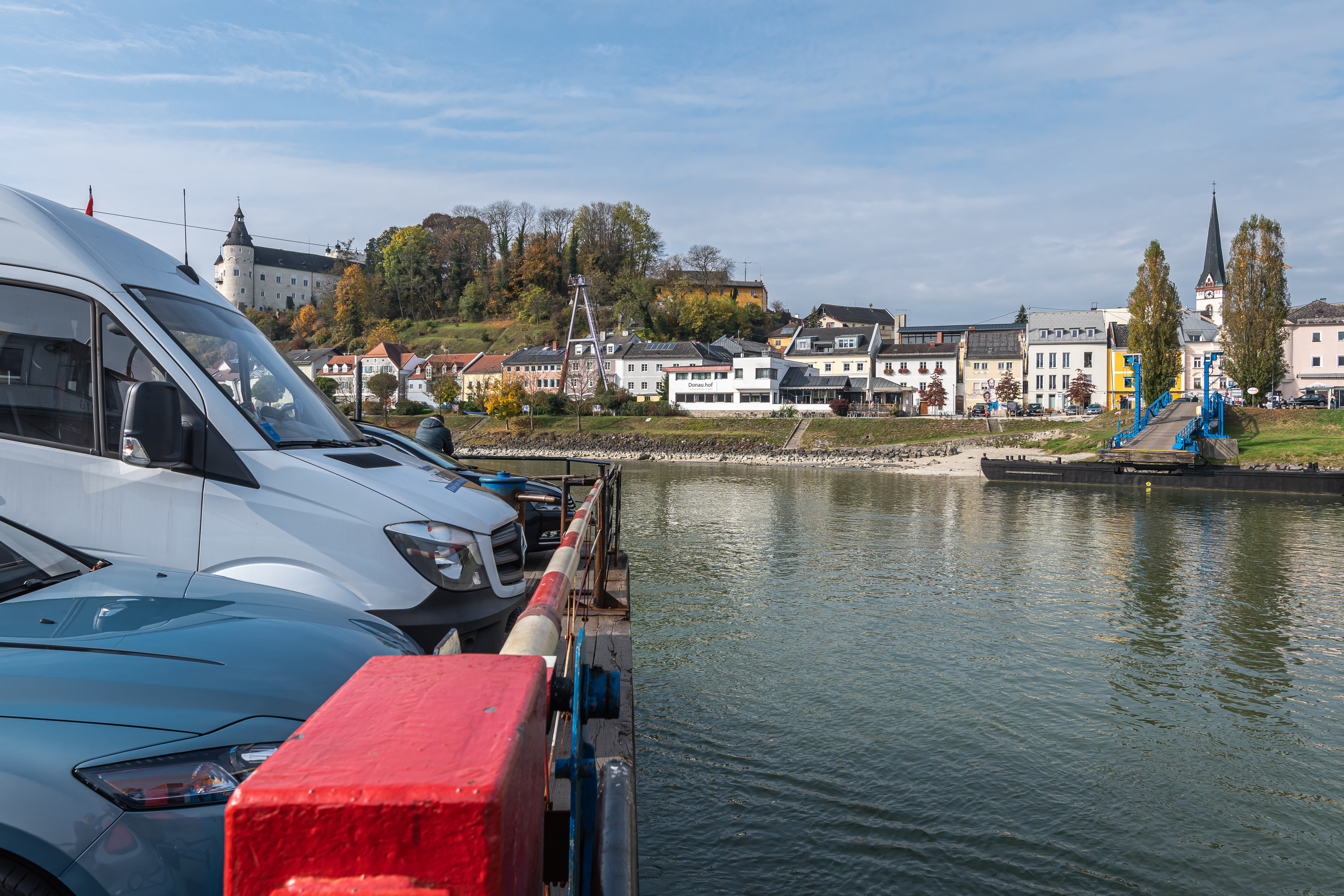 Drahtseilbrücke Ottensheim gibt es seit 1871. Das alte Fährschiff wurde 1964 durch ein neues ersetzt. Die Fähre verbindet Ottensheim mit Wilhering.